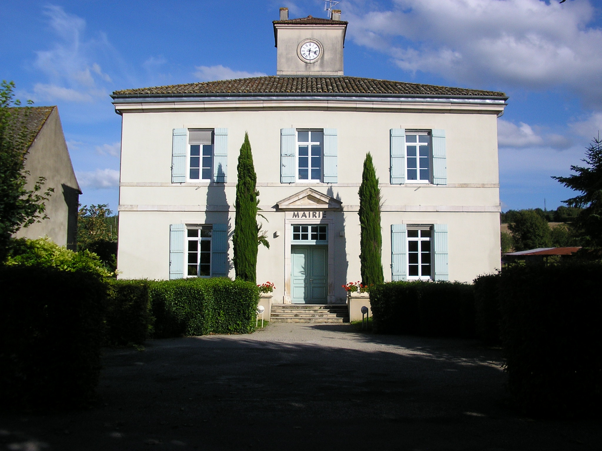 La mairie